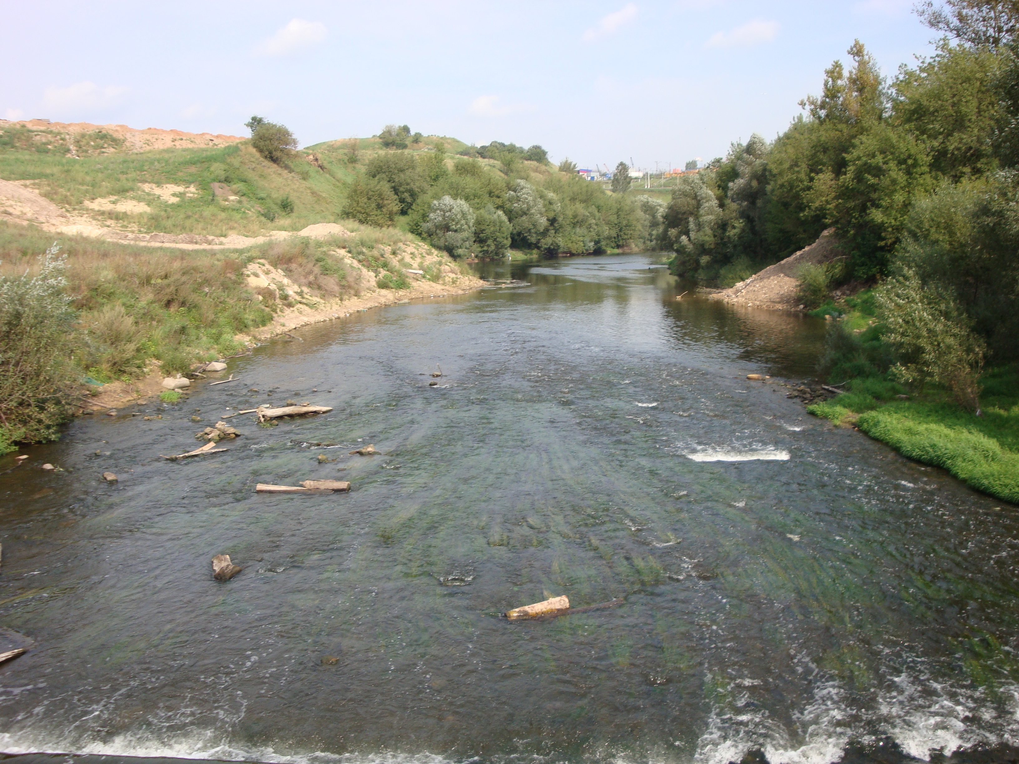 Река Пахра в Подольске после городской плотины